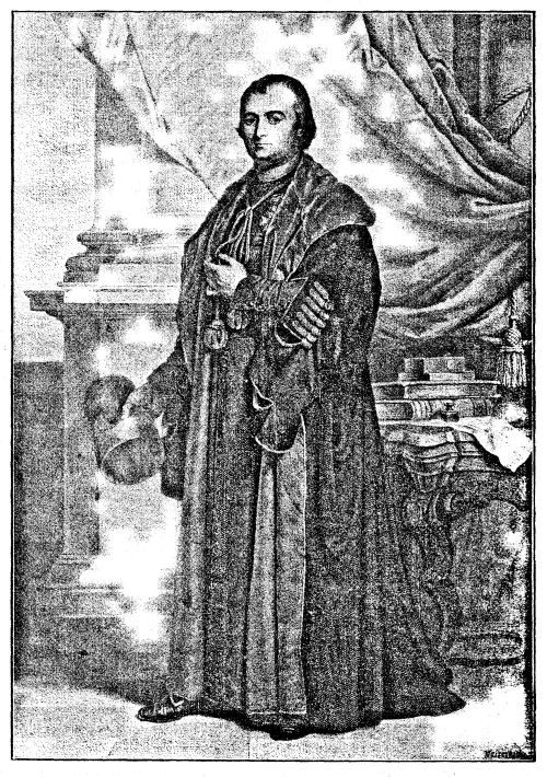 Pierre François Xavier de Ram. D'après le tableau peint en 1836, par Lambert Mathieu.